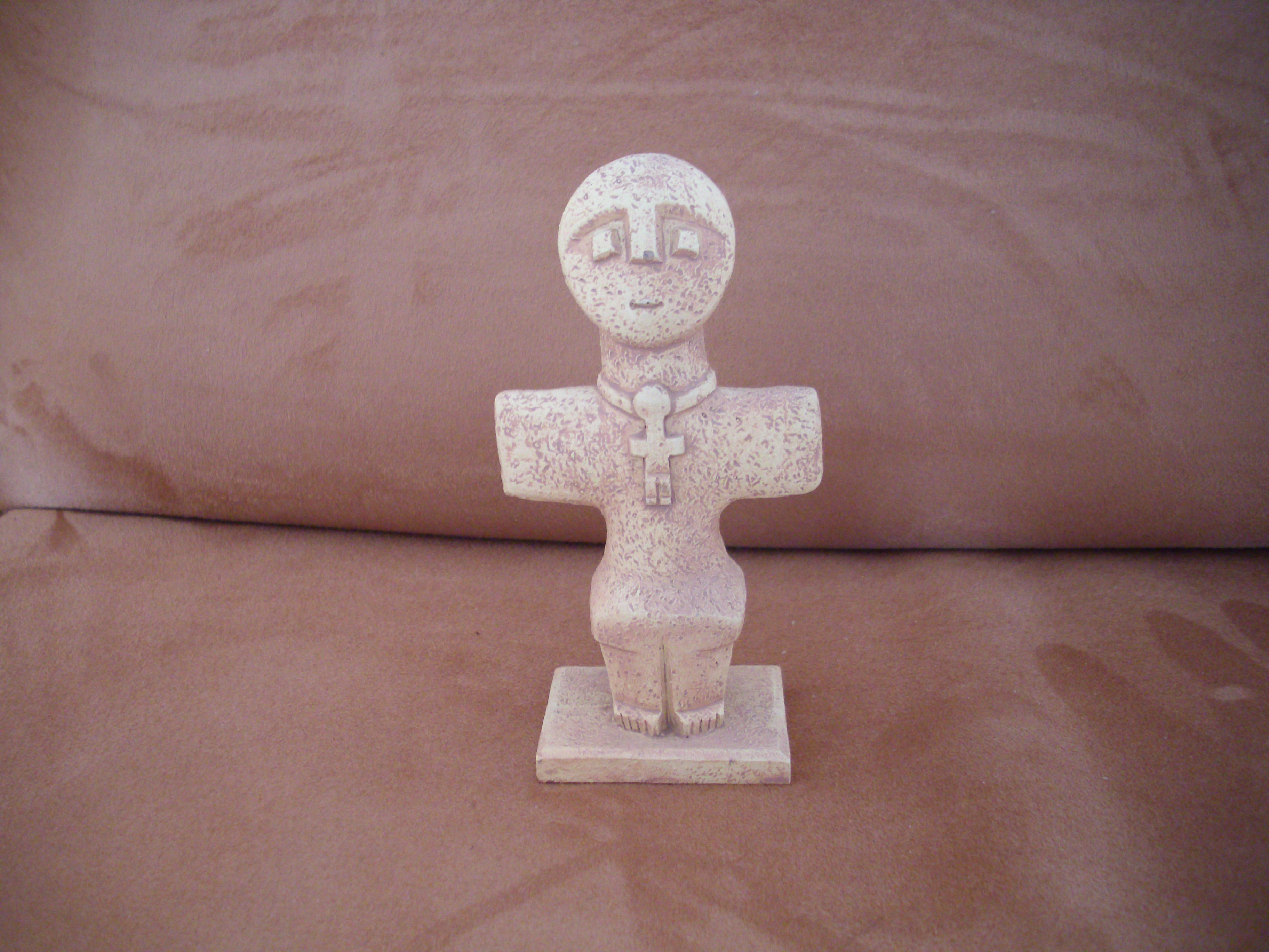 Idol von Pomos